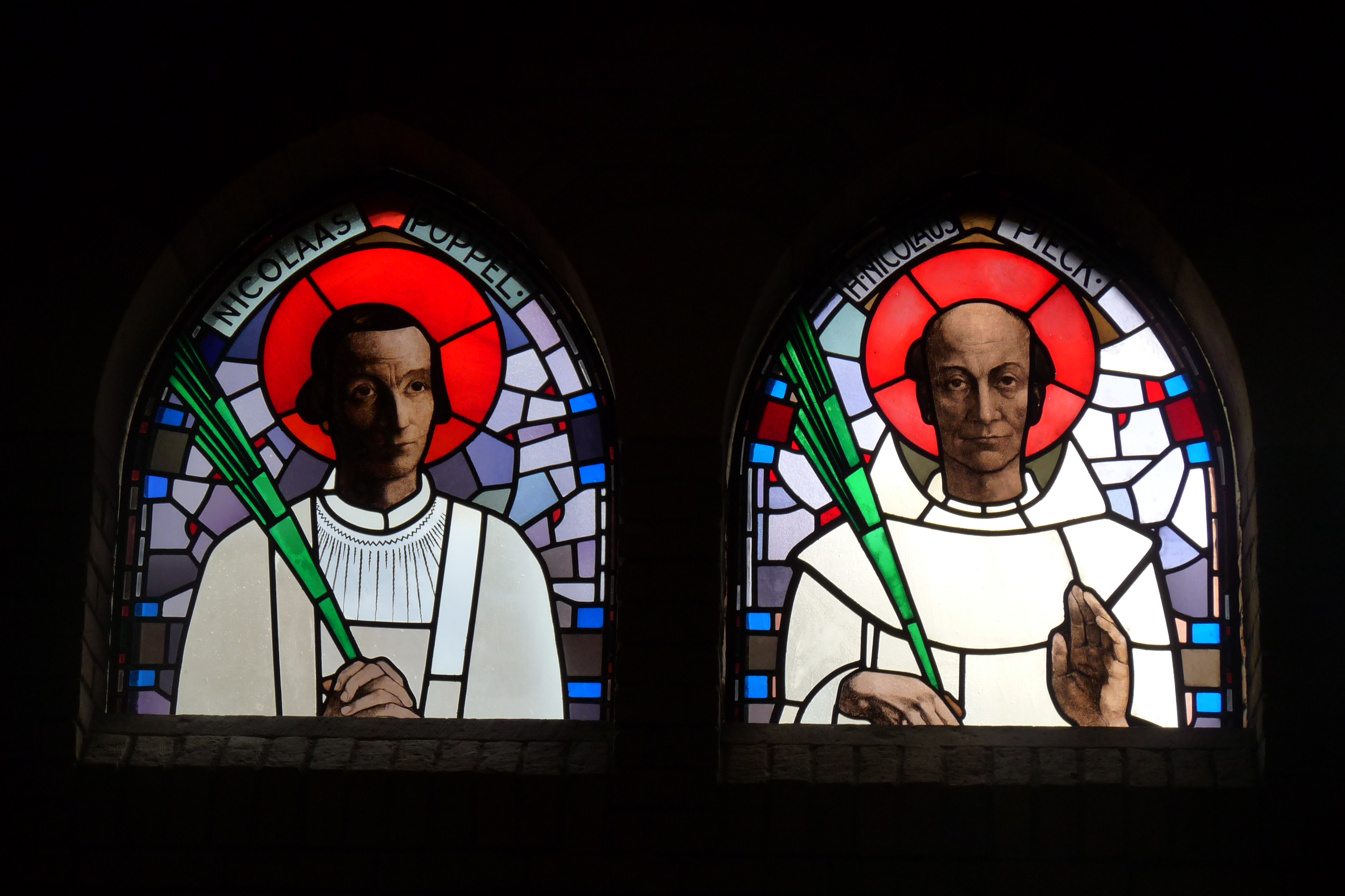 Martelaren van Gorcumkerk (Amsterdam) Interieur Glas-in-lood met martelaren van Gorcum